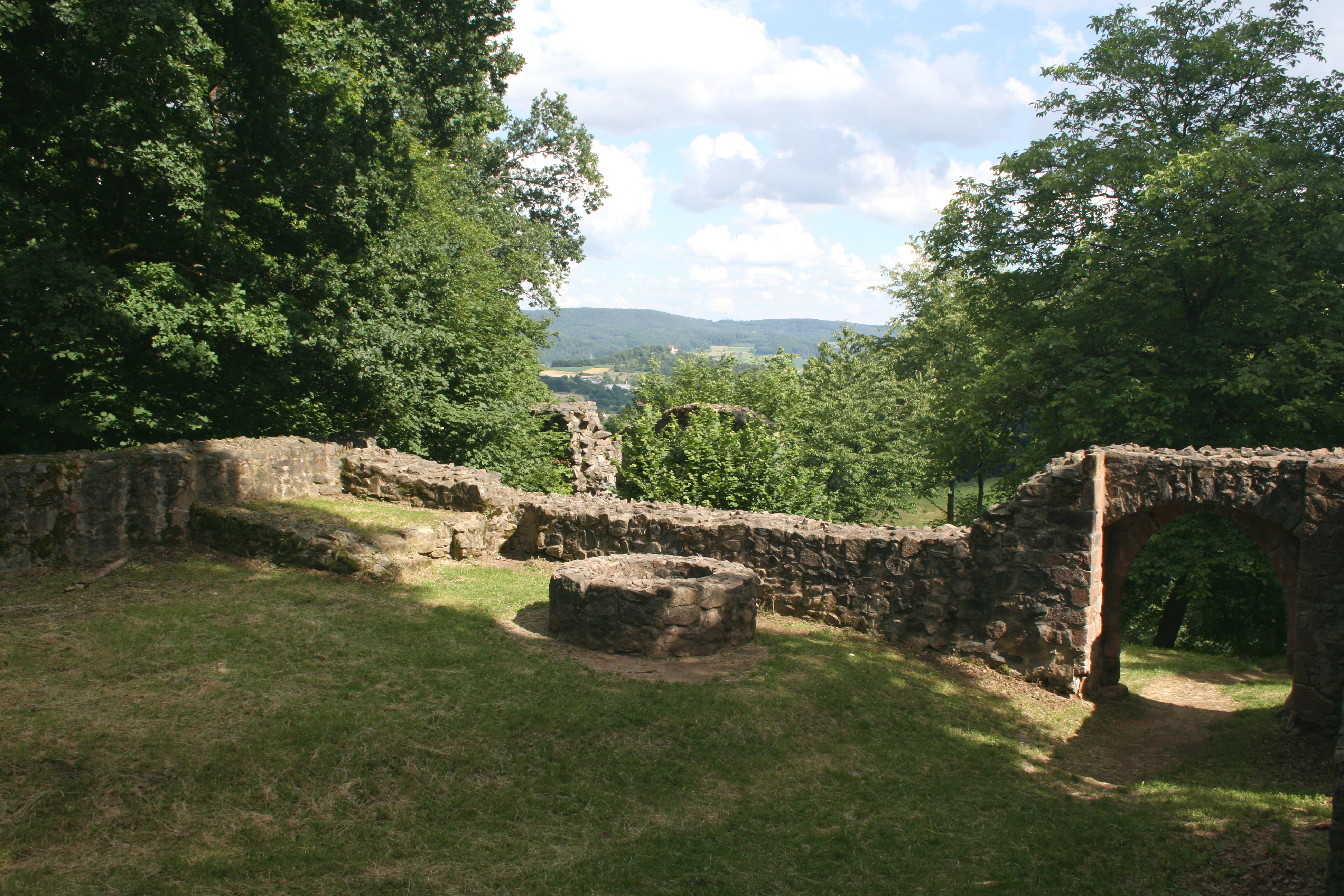 Burg Rodenstein, Innerer Burghof, Blick nach Südosten, im Hintergrund: Schloss Reichenberg.